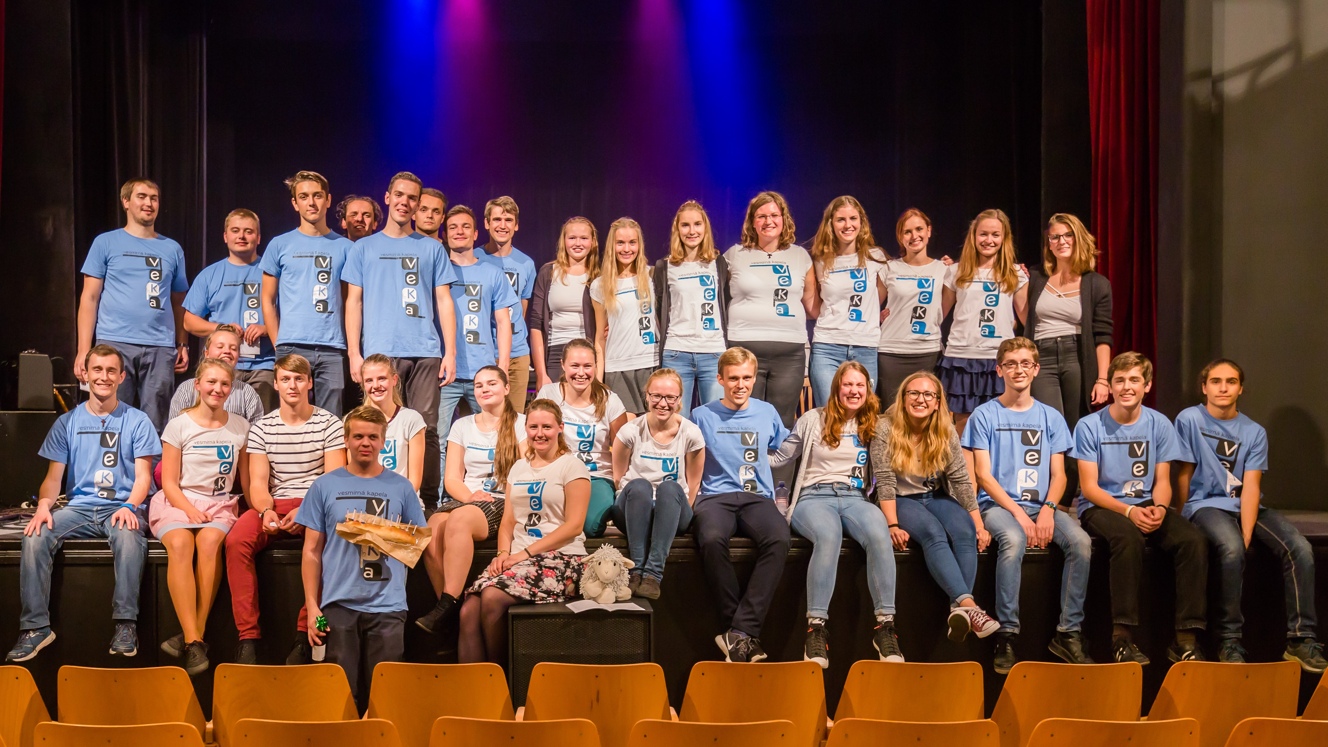 Vesmírná Kapela v roce 2018